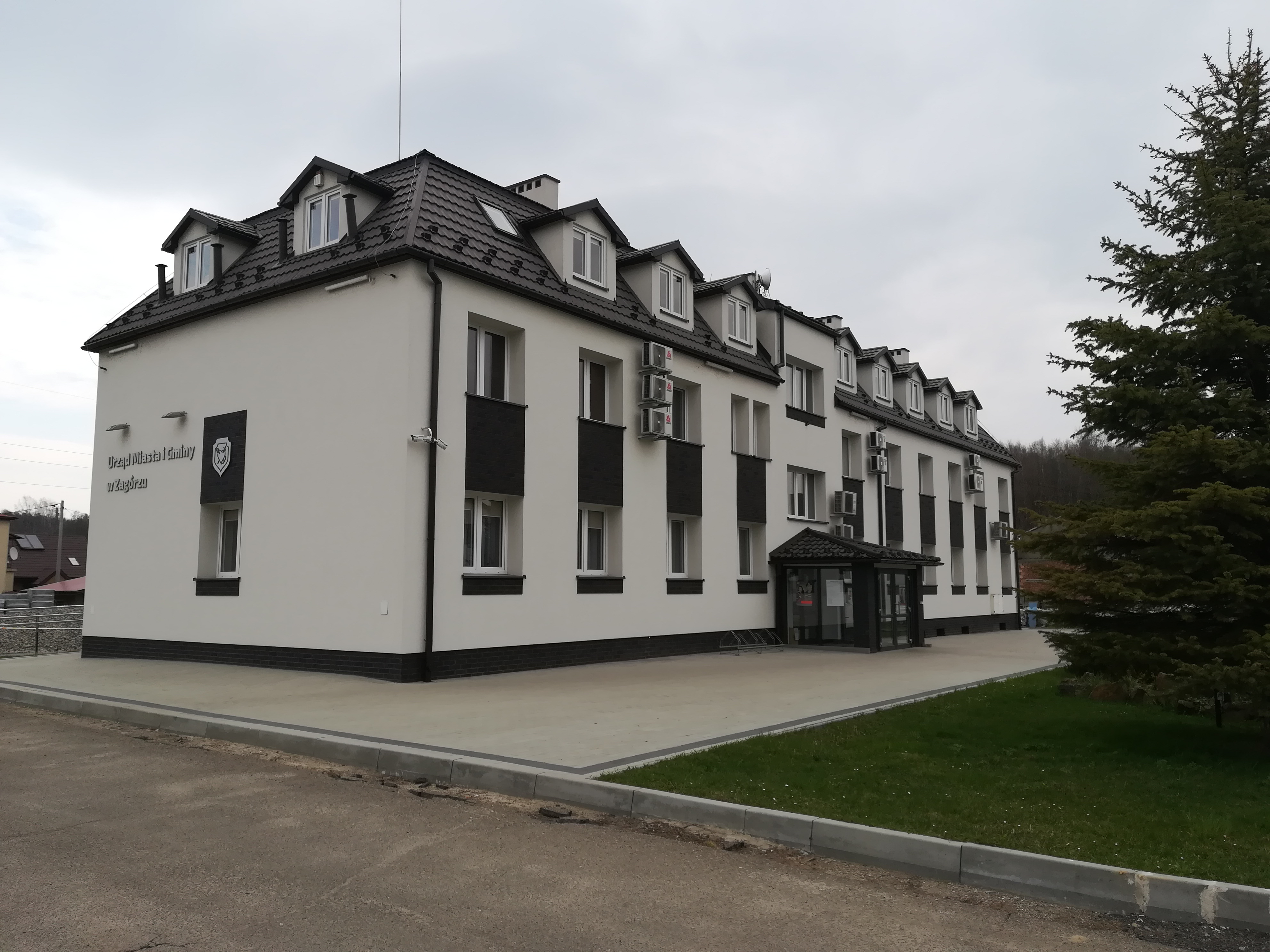 Budynek Urzędu Miasta i Gminy w Zagórzu